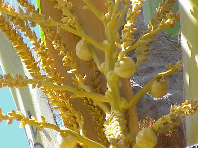 Species: Cocos nucifera Family: Arecaceae Image No. 8